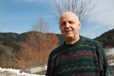 Foto di Reinhard Siegmund-Schultze